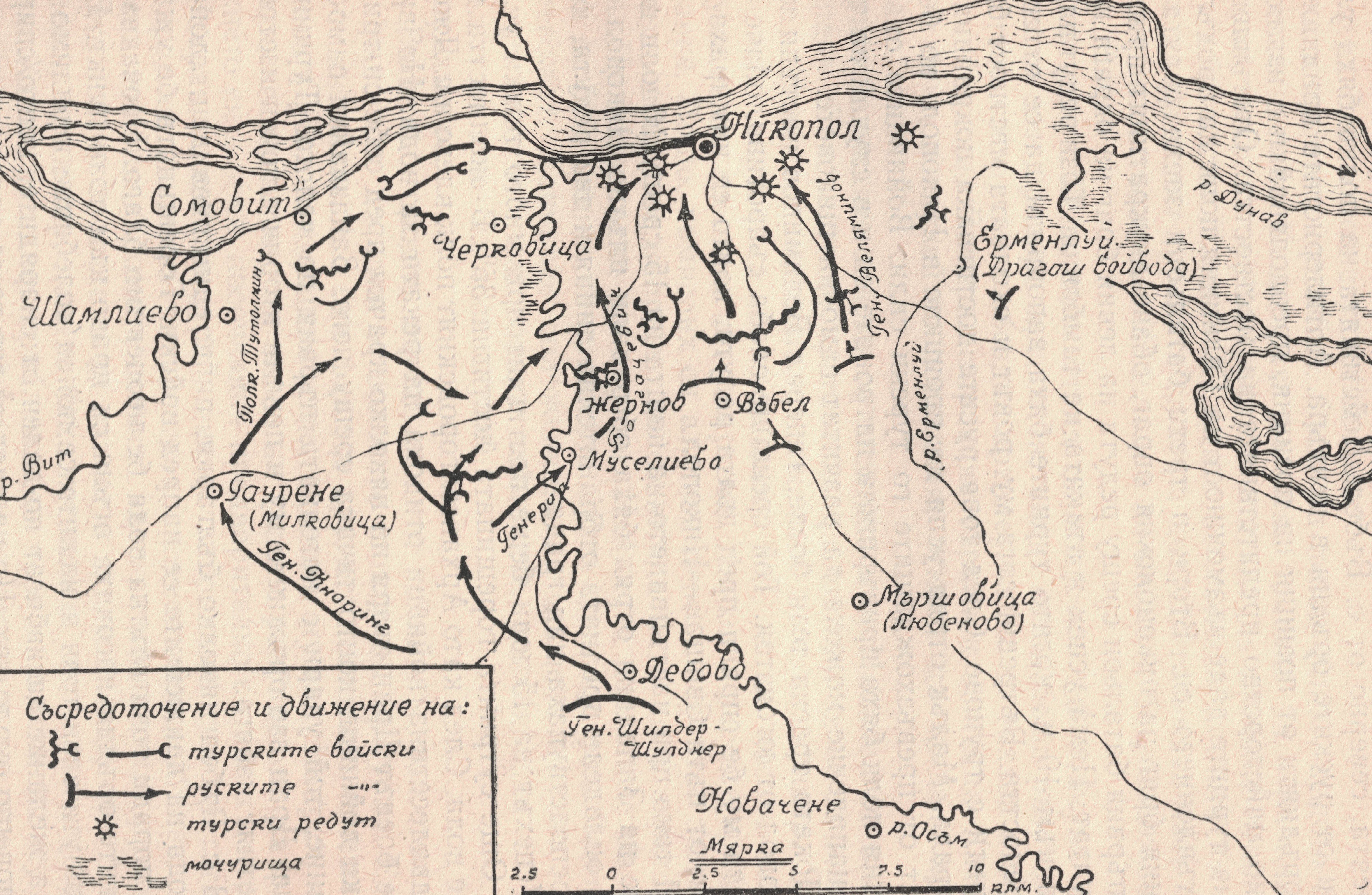 Карта на битката при Никопол на 3-4 юли 1877 г.